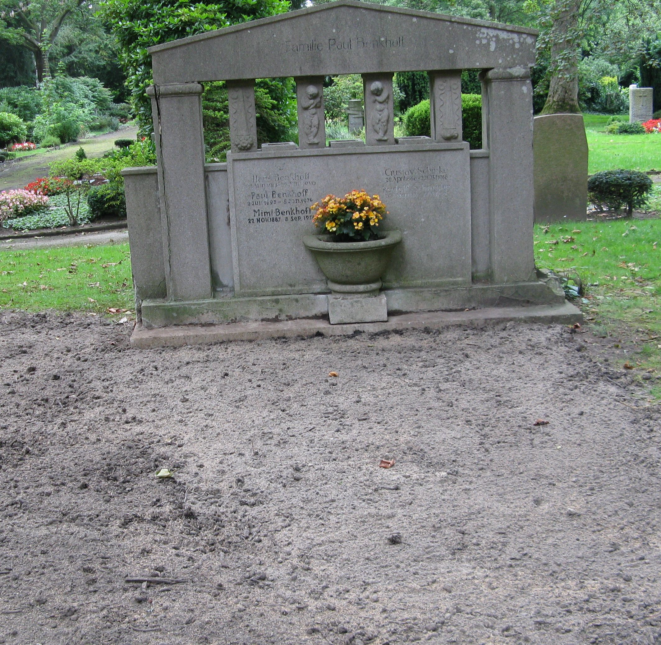 Familiengrab Benkhoff